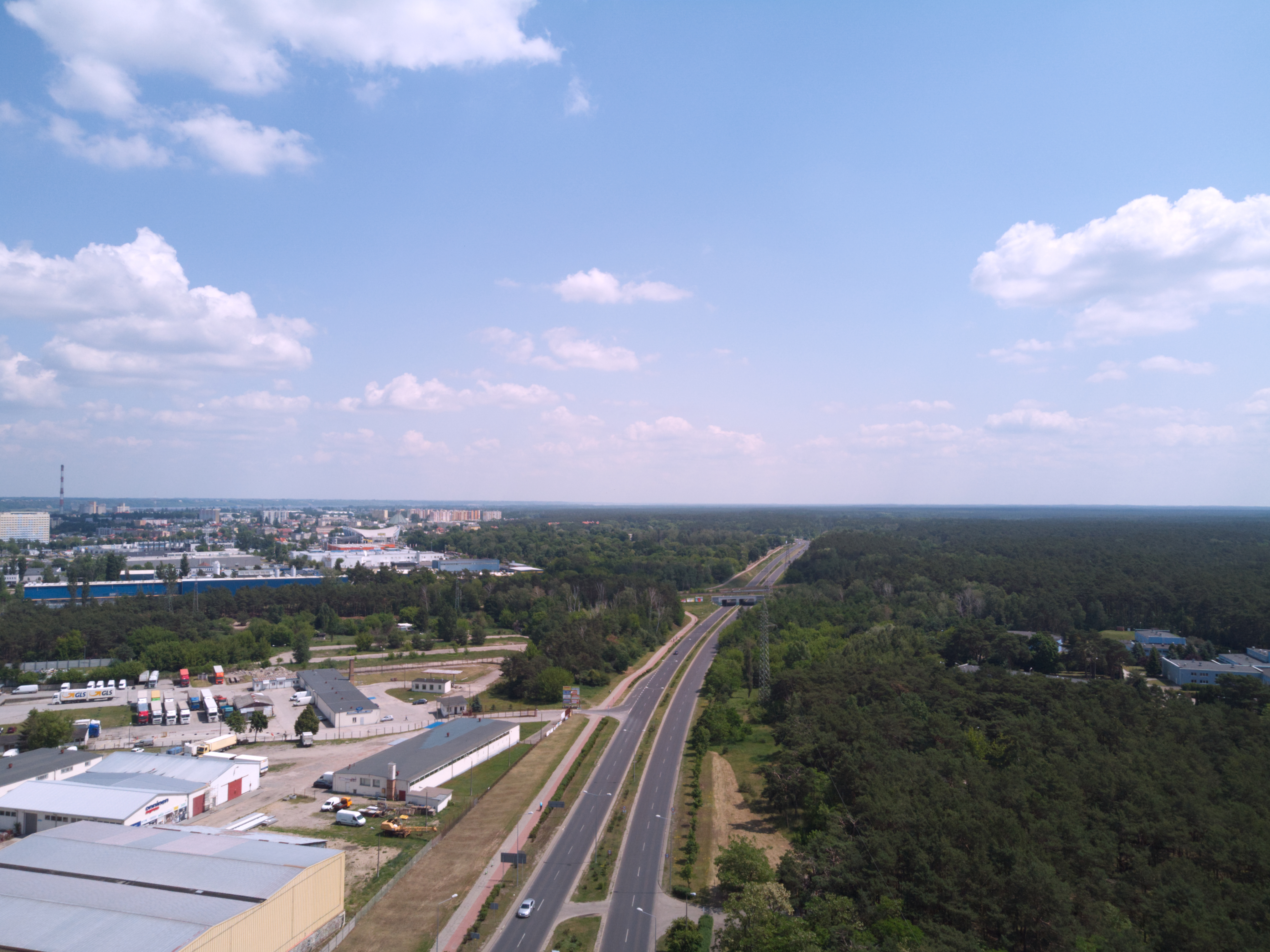 Aleja Królowej Jadwigi (2020)